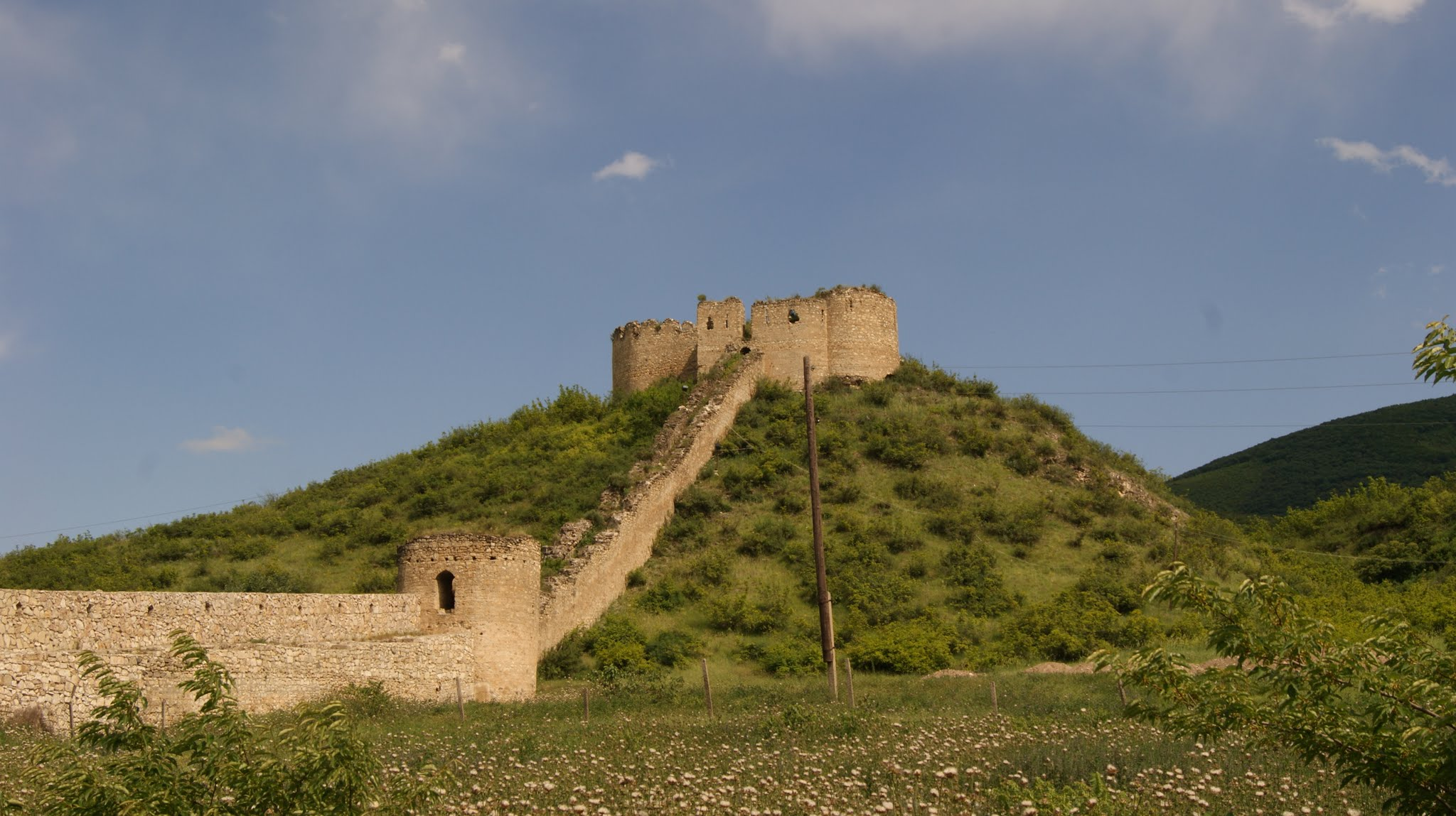 Əsgəran qalası